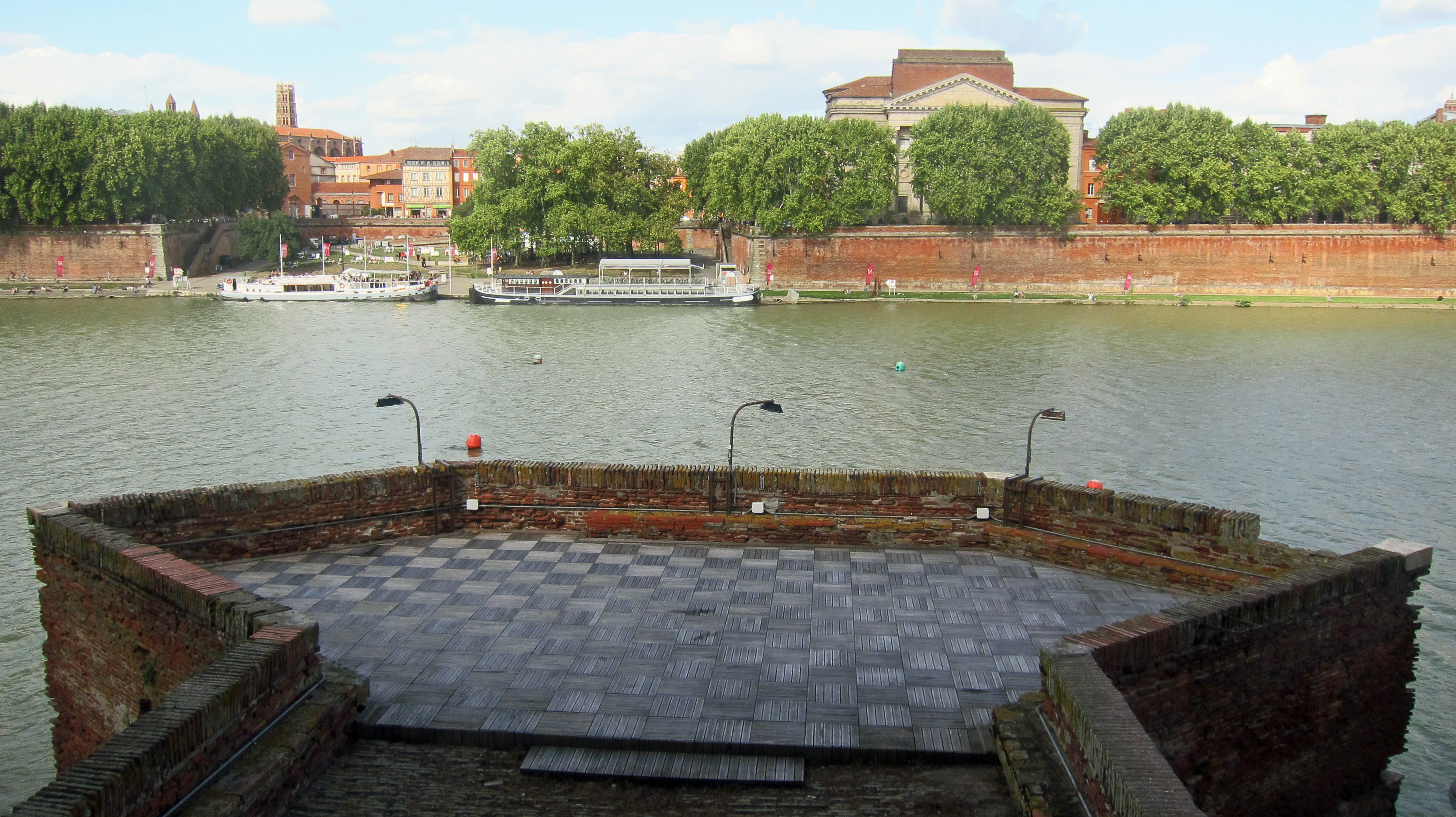 Toulouse (Haute-Garonne, France) : Le pont de la Daurade vu depuis l'Hôtel-Dieu. Les bouées indiquent l'emplacement des ruines d'une autre pile.